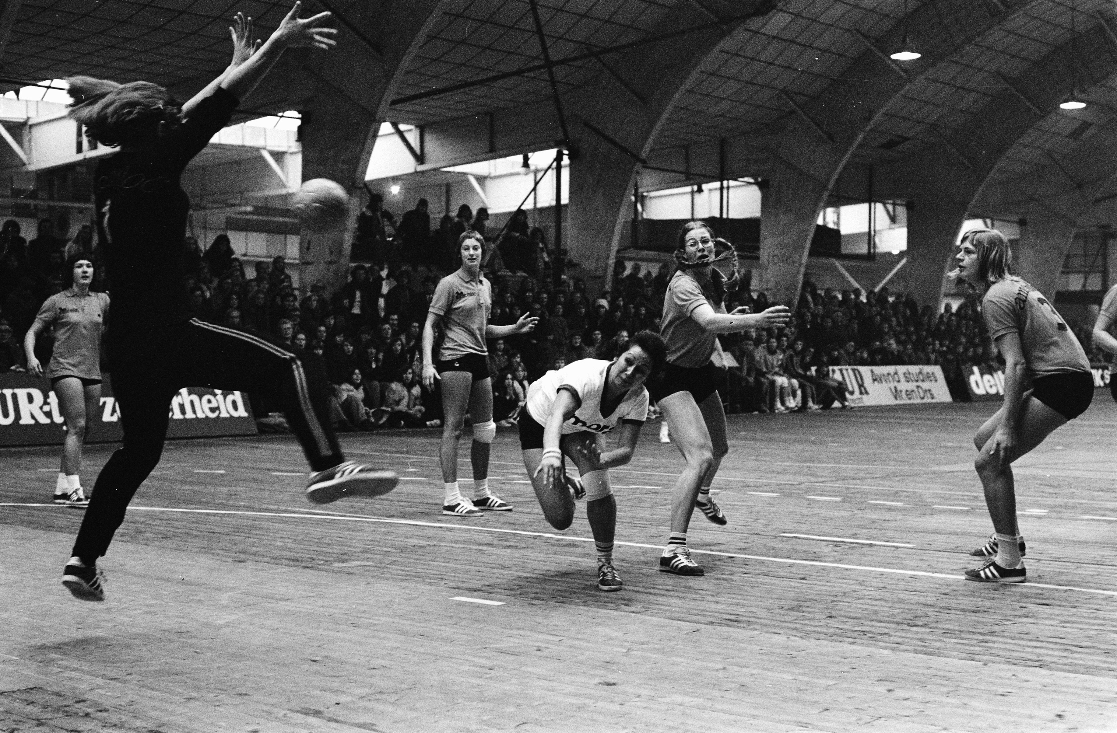 Collectie / Archief : Fotocollectie Anefo Reportage / Serie : [ onbekend ] Beschrijving : AMC Niloc tegen Swift 10-11, zaalhandbal in Oude RAI te Amsterdam ; Swift scoort langs doelvrouw Beitzer Datum : 8 december 1974 Locatie : Amsterdam Trefwoorden : handbal, sport Instellingsnaam : Swift Fotograaf : Verhoeff, Bert / Anefo Auteursrechthebbende : Nationaal Archief Materiaalsoort : Negatief (zwart/wit) Nummer archiefinventaris : bekijk toegang 2.24.01.05 Bestanddeelnummer : 927-6314